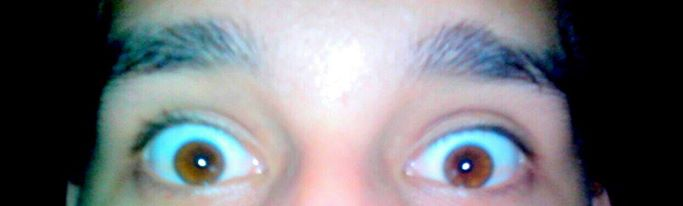 Ojos marrones, con ligera heterocromia bilateral.